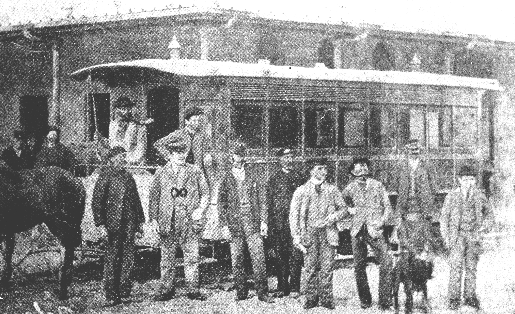 Último tranvía a caballos de Buenos Aires, y los empleados de la línea.